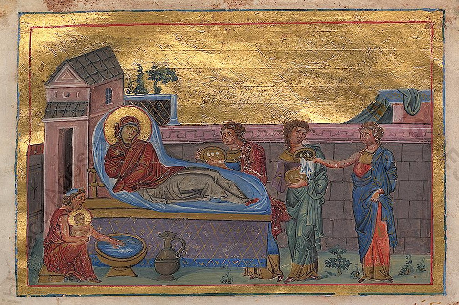 Miniatur des sogenannten "Menologion" des Kaisers Basileios II.